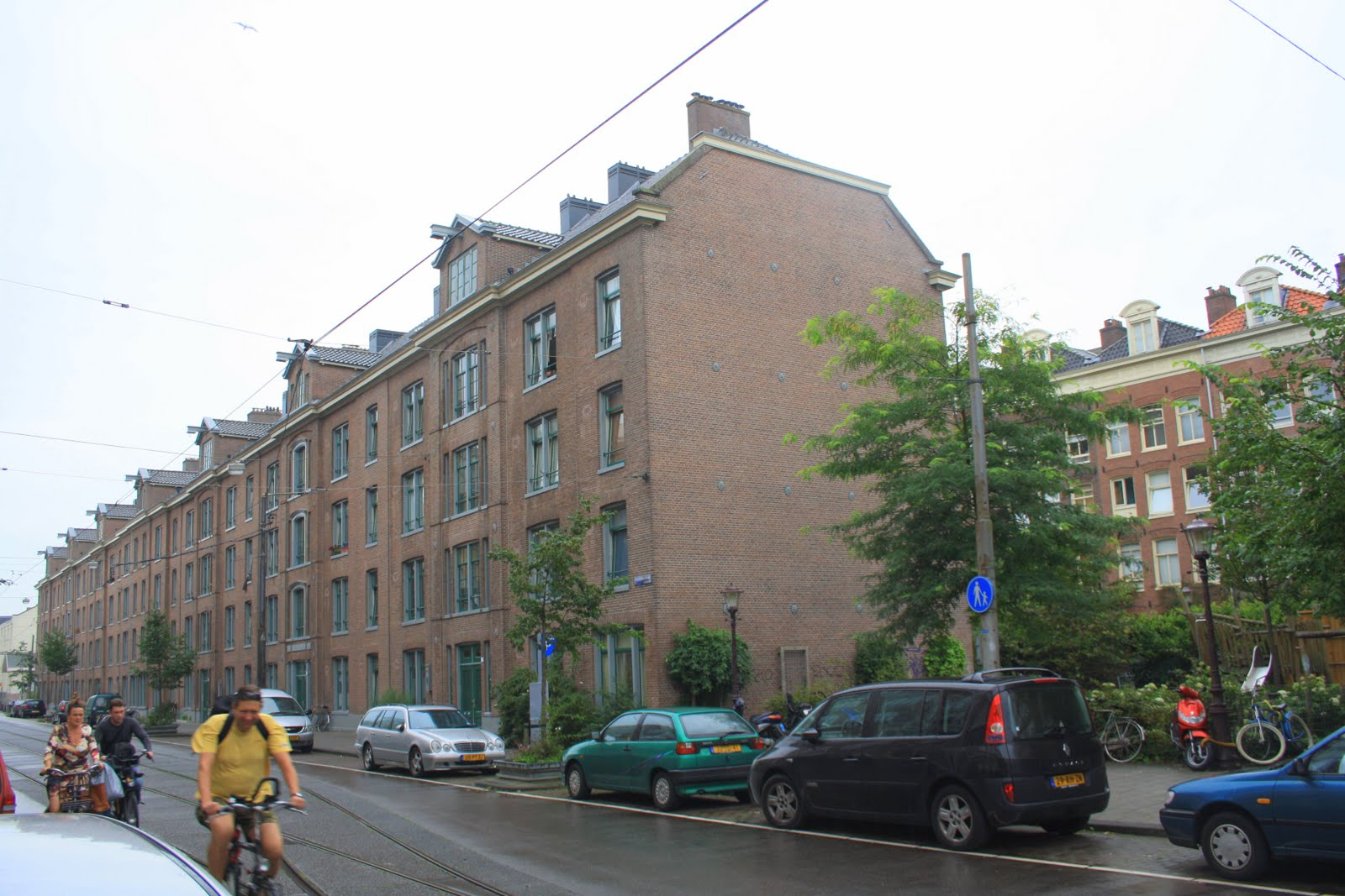 Amsterdam - Planciusstraat, complex arbeiderswoningen uit 1856 van de Vereeniging ten behoeven der Arbeidersklasse te Amsterdam. Architect P.J. Hamer